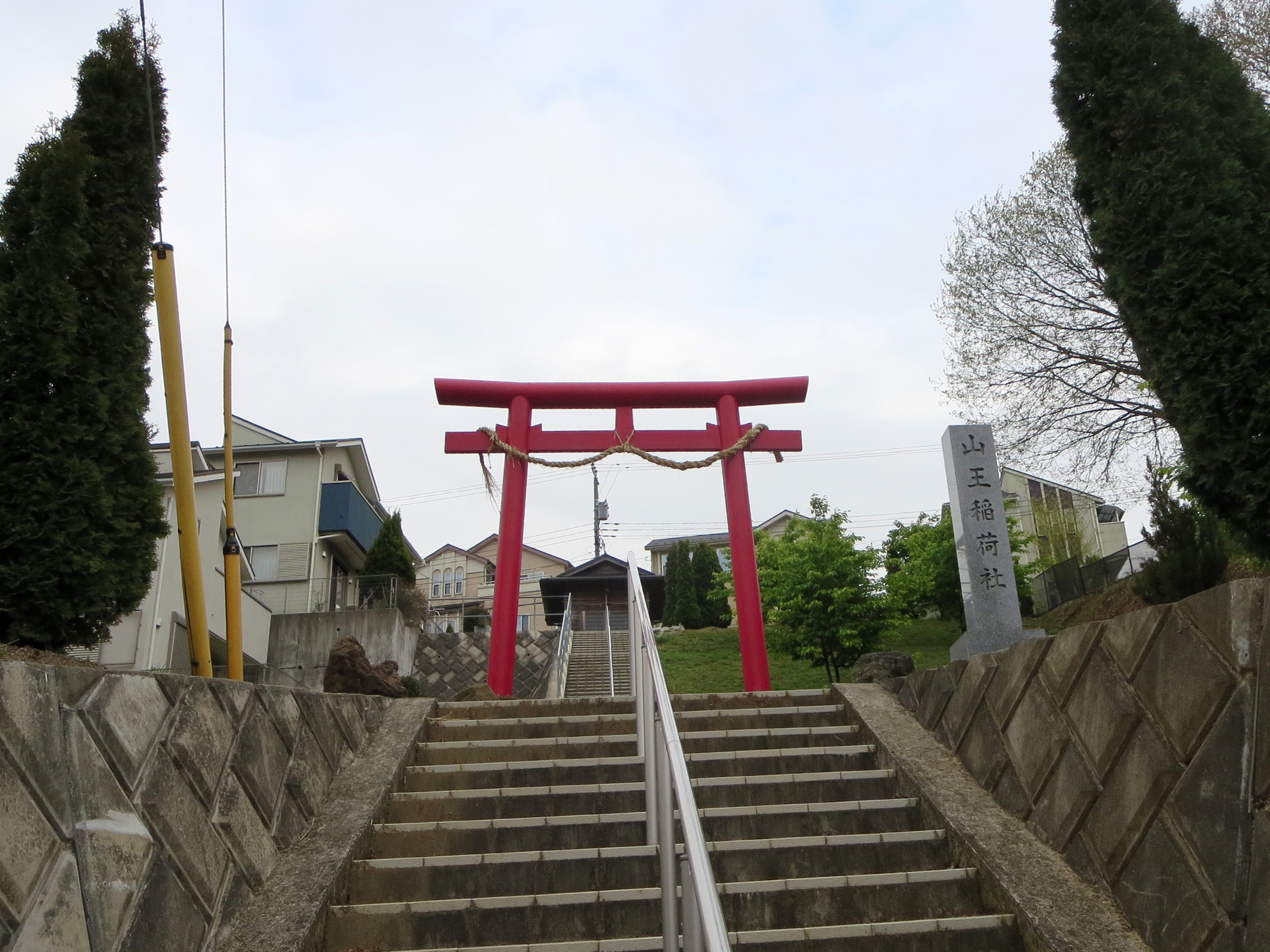 山王稲荷社 鳥居（神奈川県海老名市望地）